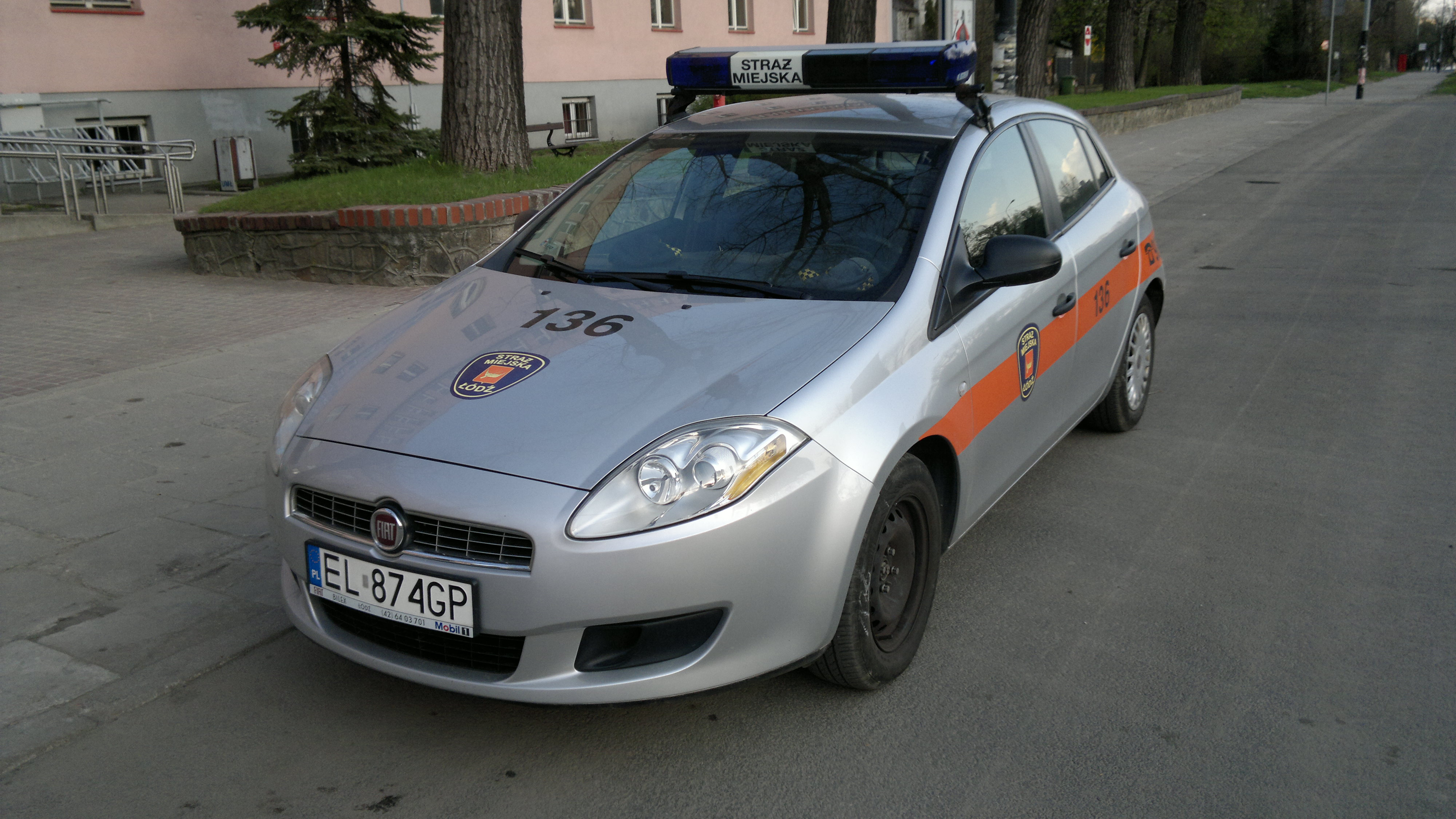 Fiat Bravo - Straz Miejska Lodz